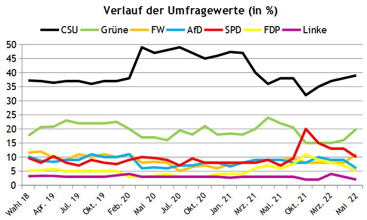 Umfragen zur Bayerwahl 2023